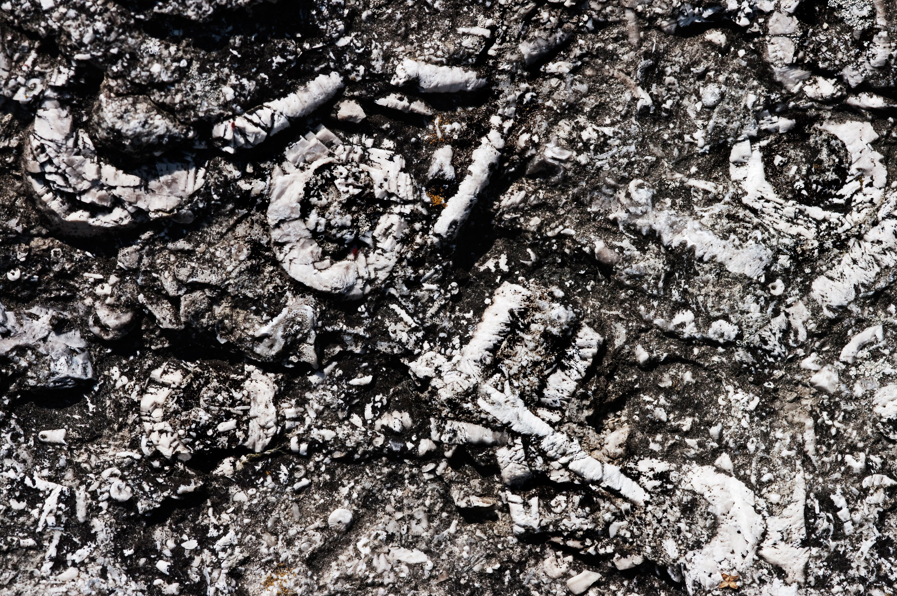 Sõrmuspaas Kaugatoma pangalEesti: Crinoid fossils on Kaugatoma stage